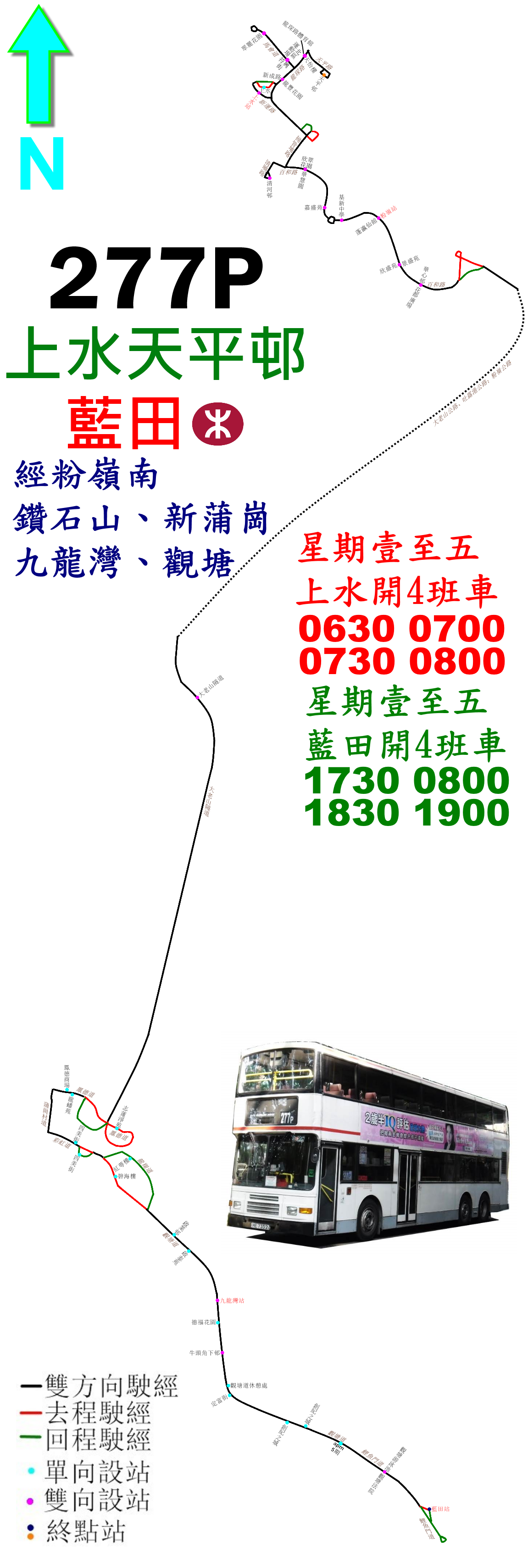 中文（香港）: 九巴277P線的走線圖